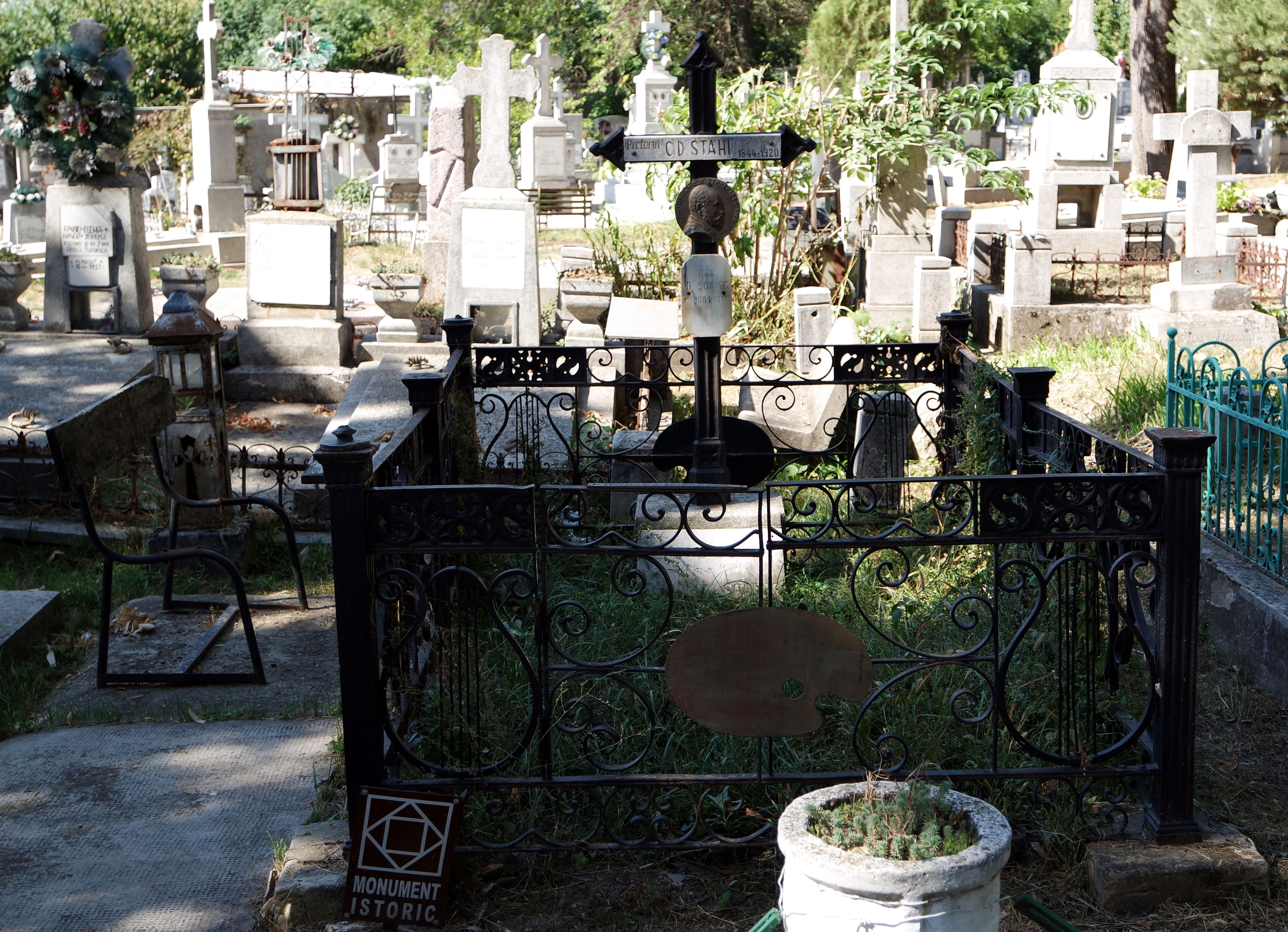 Mormântul pictorului Constantin D. Stahi Iași, Cimitirul Eternitatea, parcela 21I